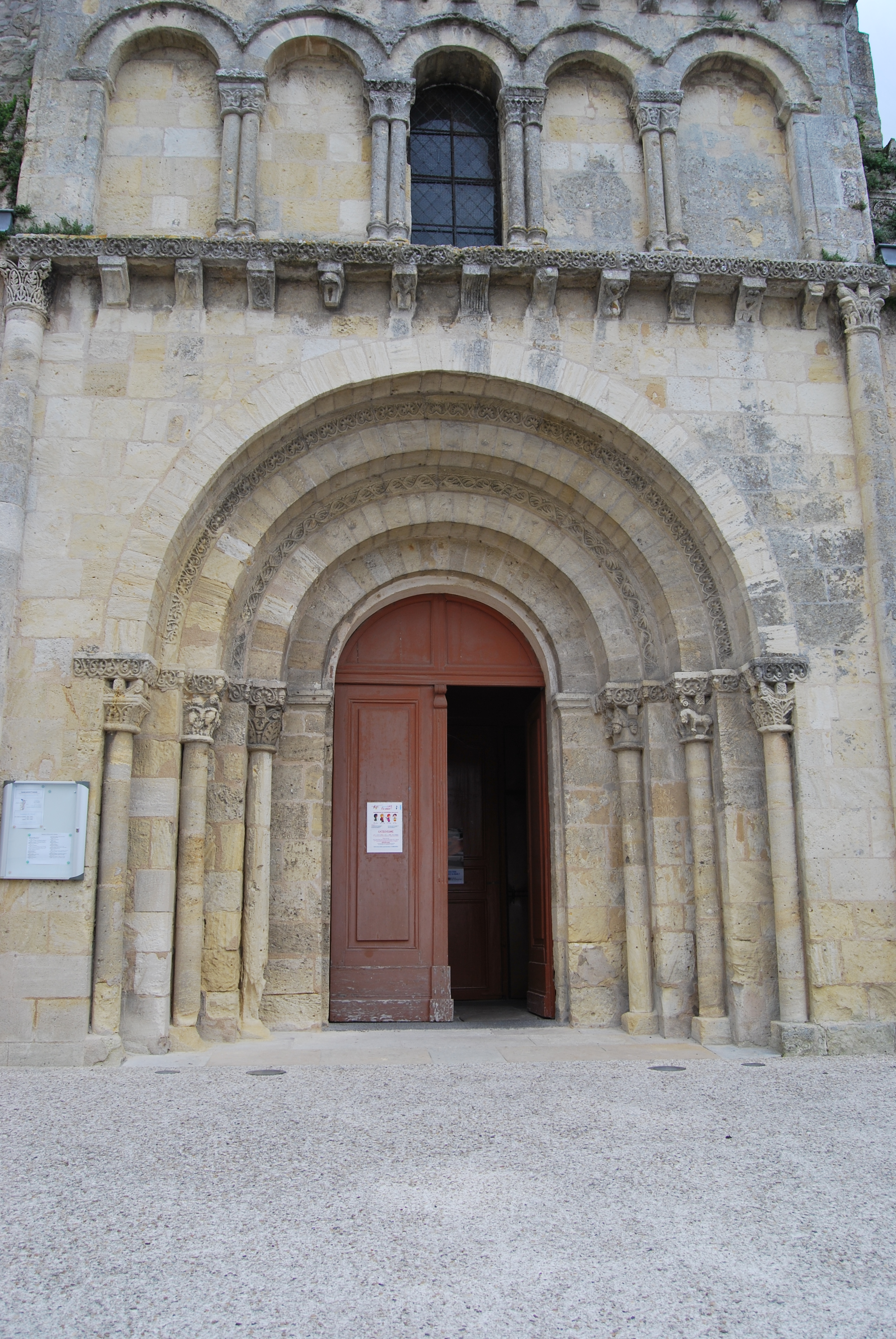 Ambares-et-Lagrave (Gironde) église St Pierre